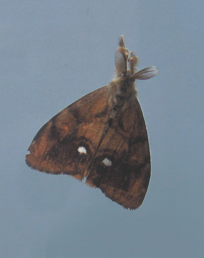 Orgyia antiqua; family Lymantridae